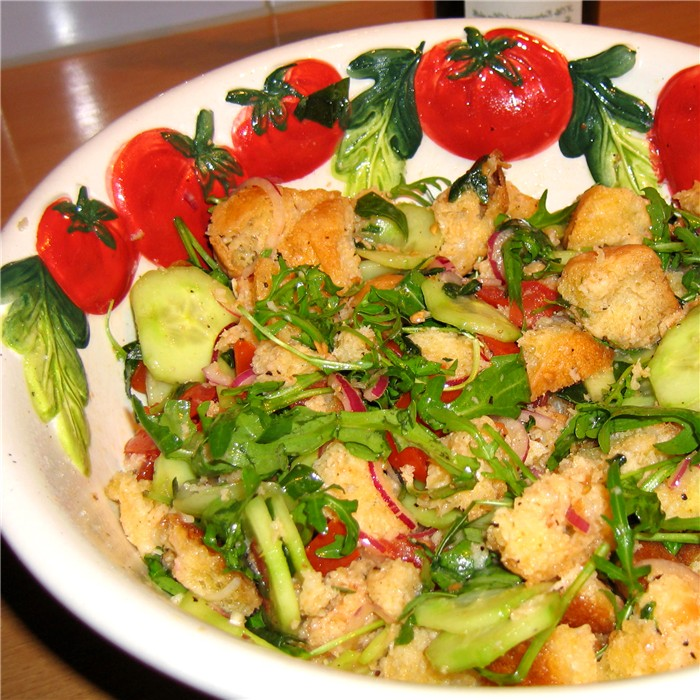 Receta de Panzanella